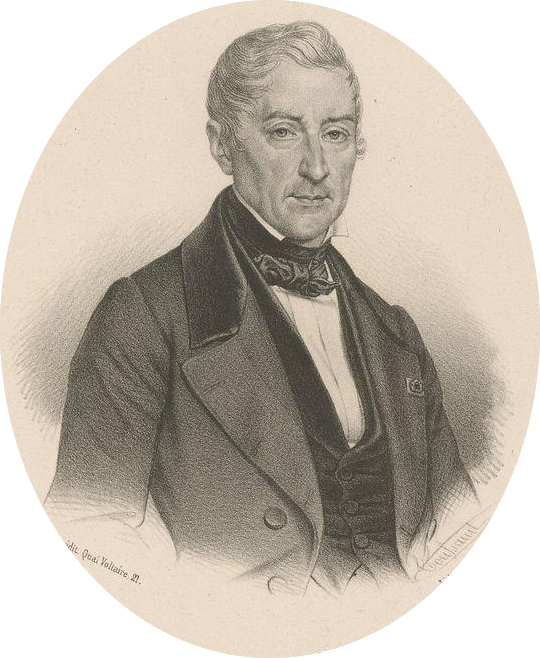 Portrait de Louis-Etienne Héricart de Thury, ingénieur des Mines, homme politique et homme de science.